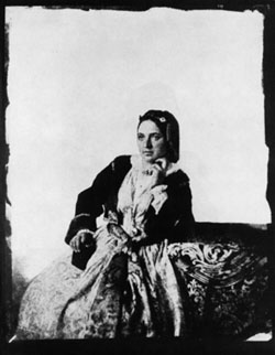 Милица Стојадиновић Српкиња, портрет Анастаса Јовановића (1817-1899) из 1850-51.